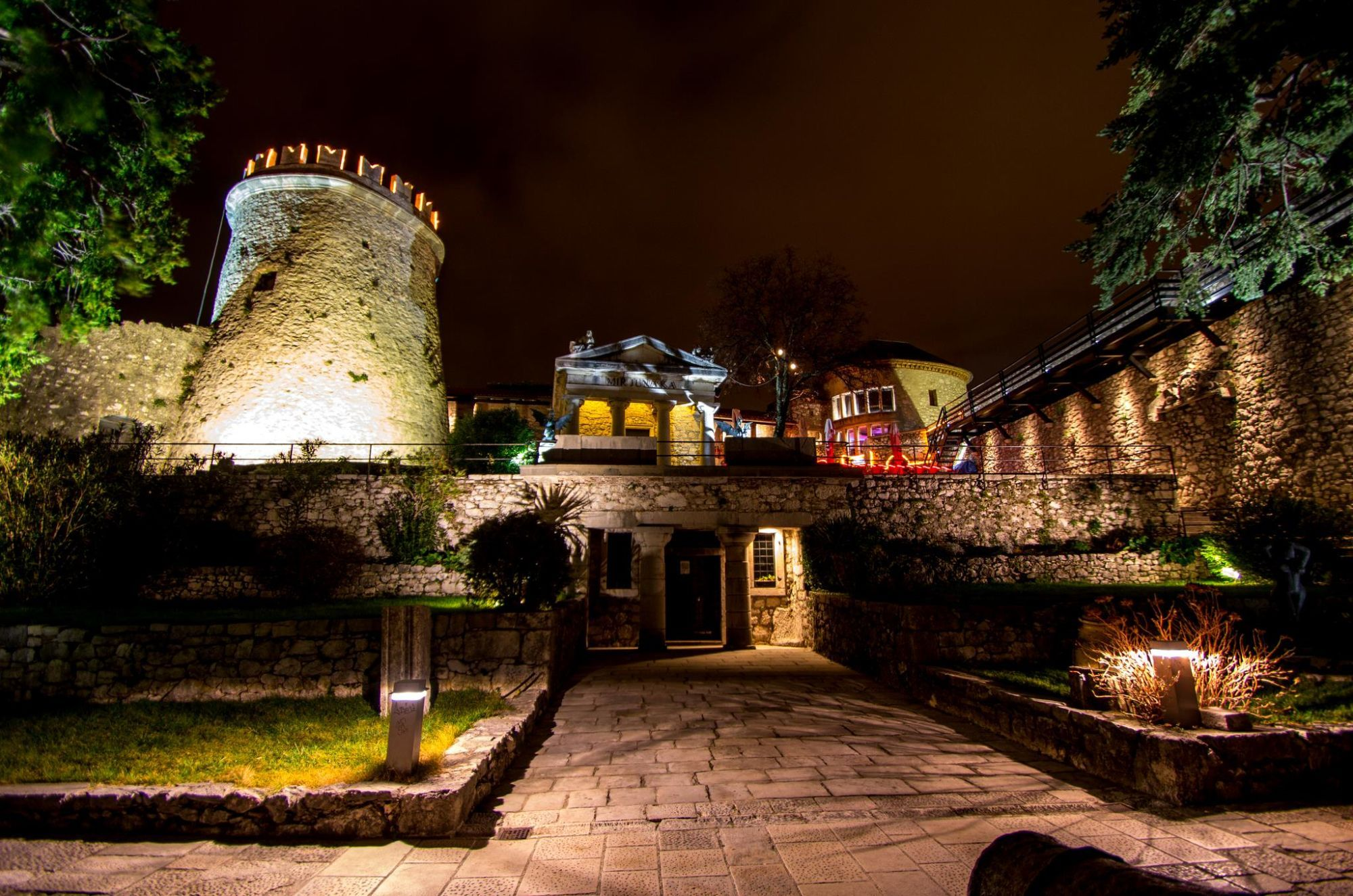 Trsat Castle, Rijeka, Hrvatskaijeka